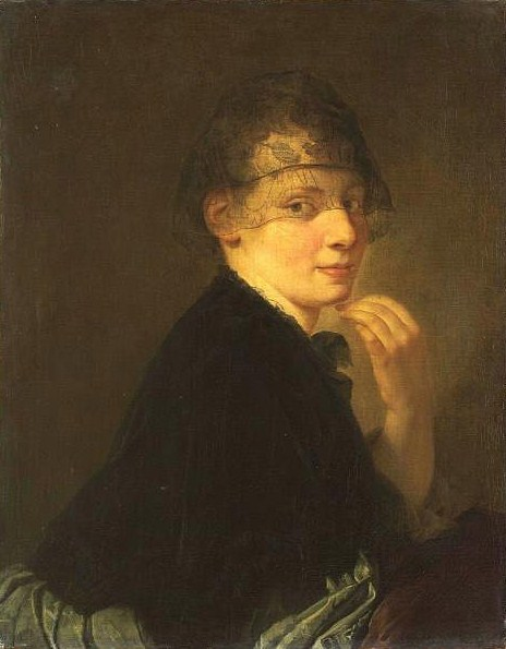 Графиня Строганова Софья Владимировна (1774-1845), ур. Голицына